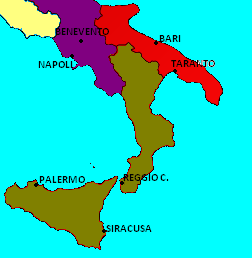 Le conquiste in Italia sotto il regno di Manuele I di Bisanzio. Versione raster di questo file. Derivato da File:Italy map with regions.svg